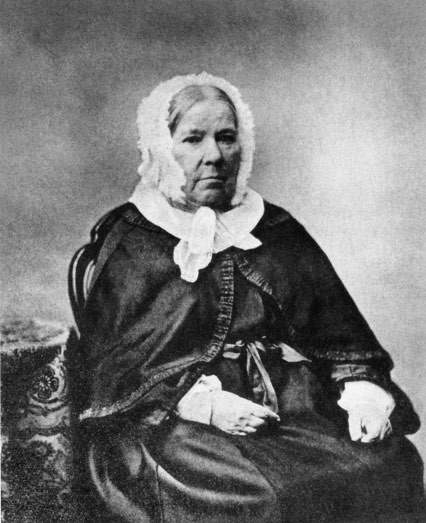 Елагина, Авдотья Петровна